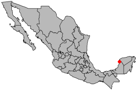 Locazione città di Calkini in mexico